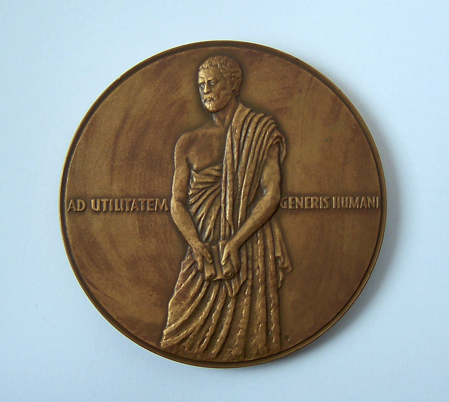 Medal pamiątkowy z podobizną Grzegorza z Sanoka (1477-1977) zaprojektowany przez Edwarda Gorola z okazji obchodów 500. rocznicy jego śmierci i wytłoczony przez Mennicę Państwową w liczbie 500 egzemplarz. Sentencja "ad utilitatem generis humani".